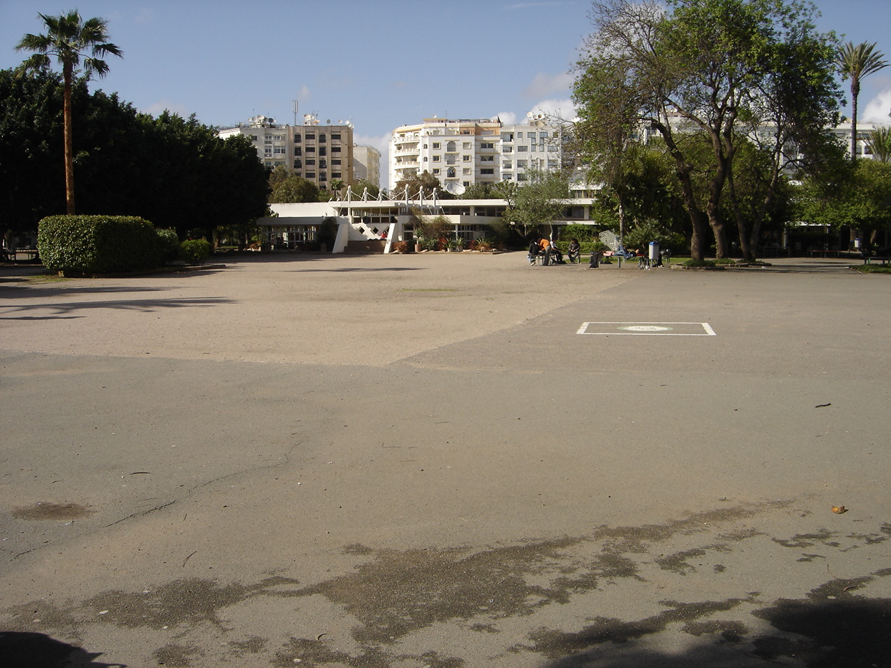 cour du lycée lyautey (CDI au fond)